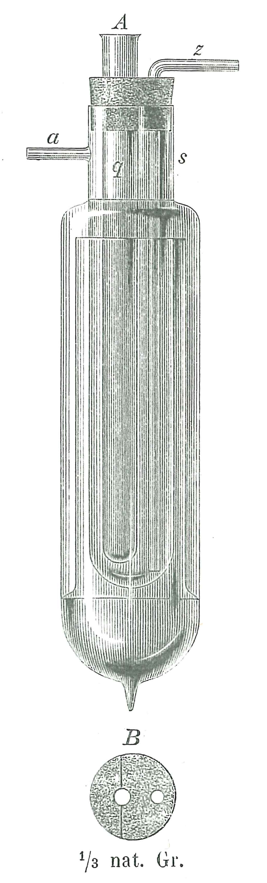 Erstes Vakuumgefäß. Figur 362 (siehe oben). An das Röhrchen a kommt der nach der Wasserluftpumpe führende Schlauch, oder wenn man keine solche hat, ein mit Kautschukschlauch abgesetztes etwa 10 mm starkes Glasrohr, das nach der Ventilationsöffnung im Tische oder, wenn auch diese fehlen sollte, durch das ein wenig geöffnete Fenster ins Freie führt. An das Rohr z kommt ein guter, schwarzer Kautschukschlauch von 10 bis 20 cm Länge. Das Zuführungsrohr z ist hier neben dem Quecksilbergefäß q in den Pfropfen eingesetzt. Über den unteren Teil von s ist ein Glasmantel übergeschmolzen, der innen einen zweiten Glaszylinder trägt und mittels der Quecksilberluftpumpe vollkommen luftleer gemacht ist. Man kann anstatt des Quecksilbergefäßes q auch das Gefäß des Luftthermometers in diesem Apparat einführen, dann schneidet man einen doppelt durchbohrten Korkpfropfen so durch, wie bei B angedeutet ist; in die undurchgeschnittene Bohrung kommt das Rohr z, in die durchschnittene das Rohr des Thermometergefäßes; nach dem Einsetzen in s wird der Pfropfen durch Überziehen mit Klebwachs dicht gemacht.